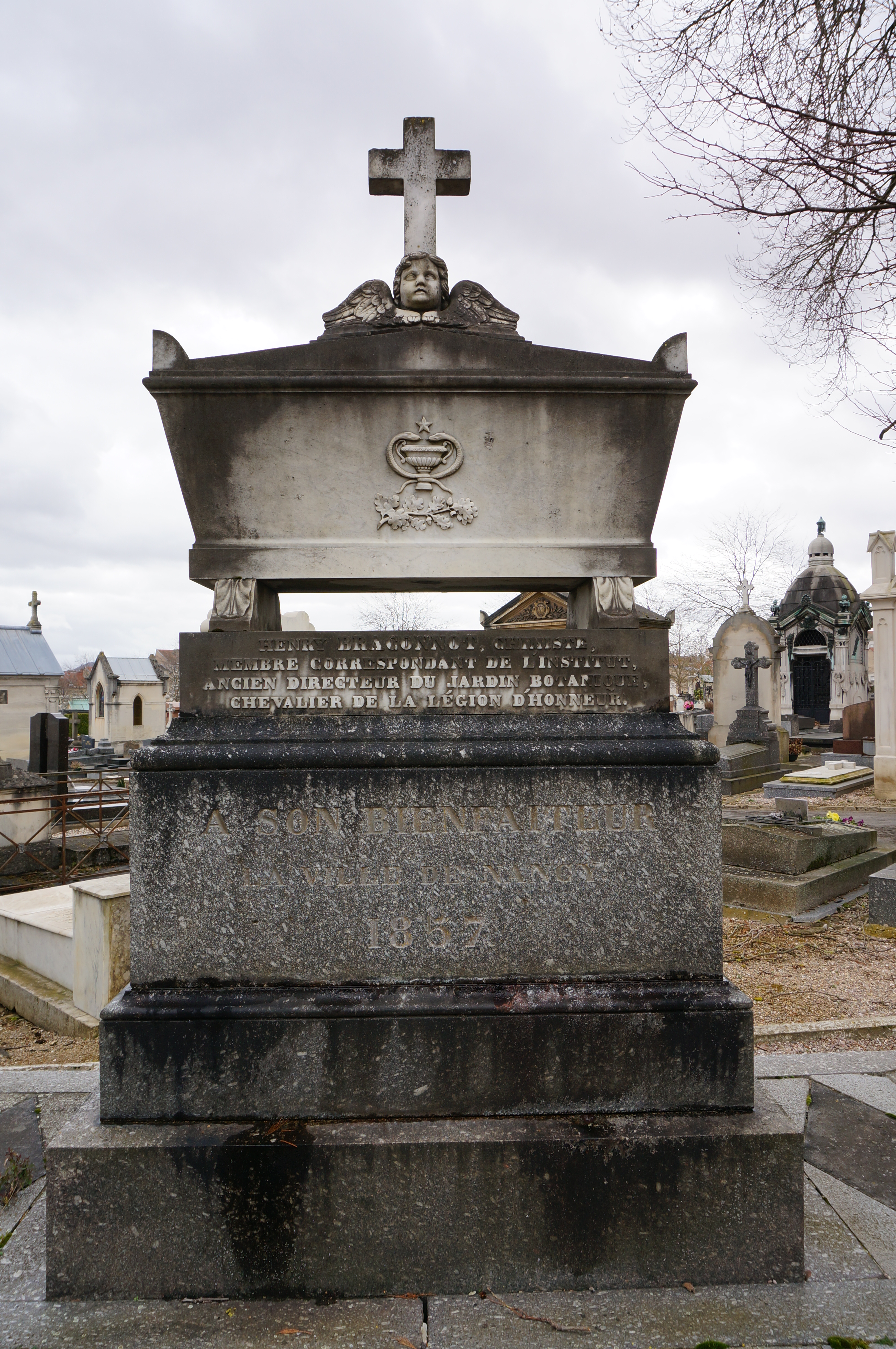 Visible au Cimetière de Préville.